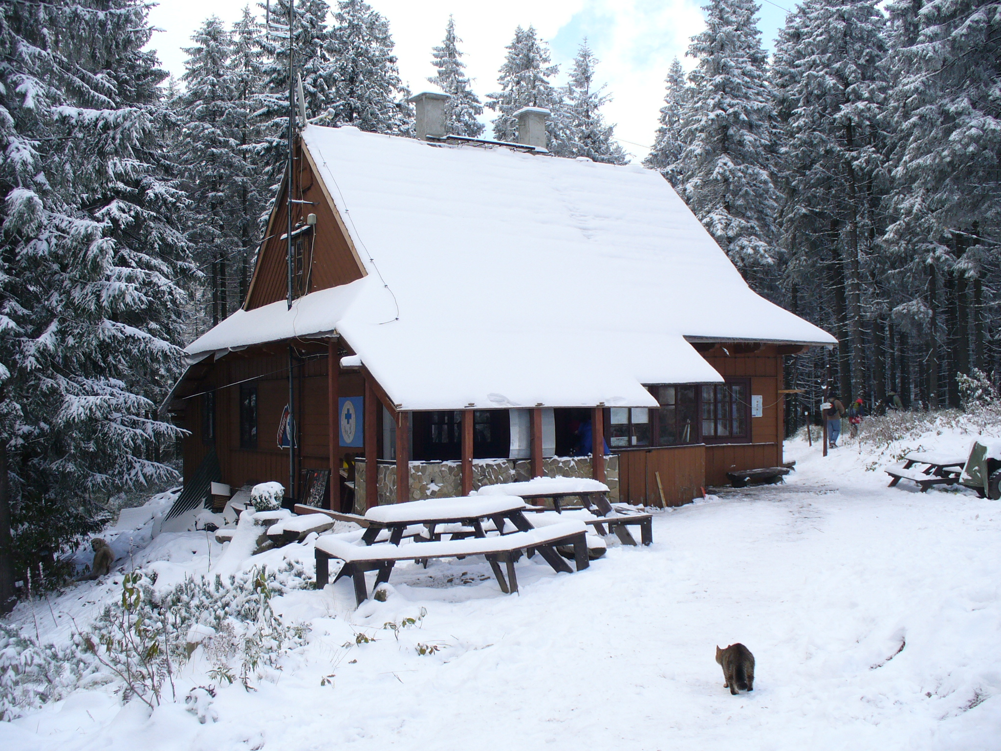 Goprówka na Markowych Szczawinach